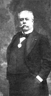 El Marqués de Alta Villa, fallecido recientemente. Obra del fotógrafo Kaulak.